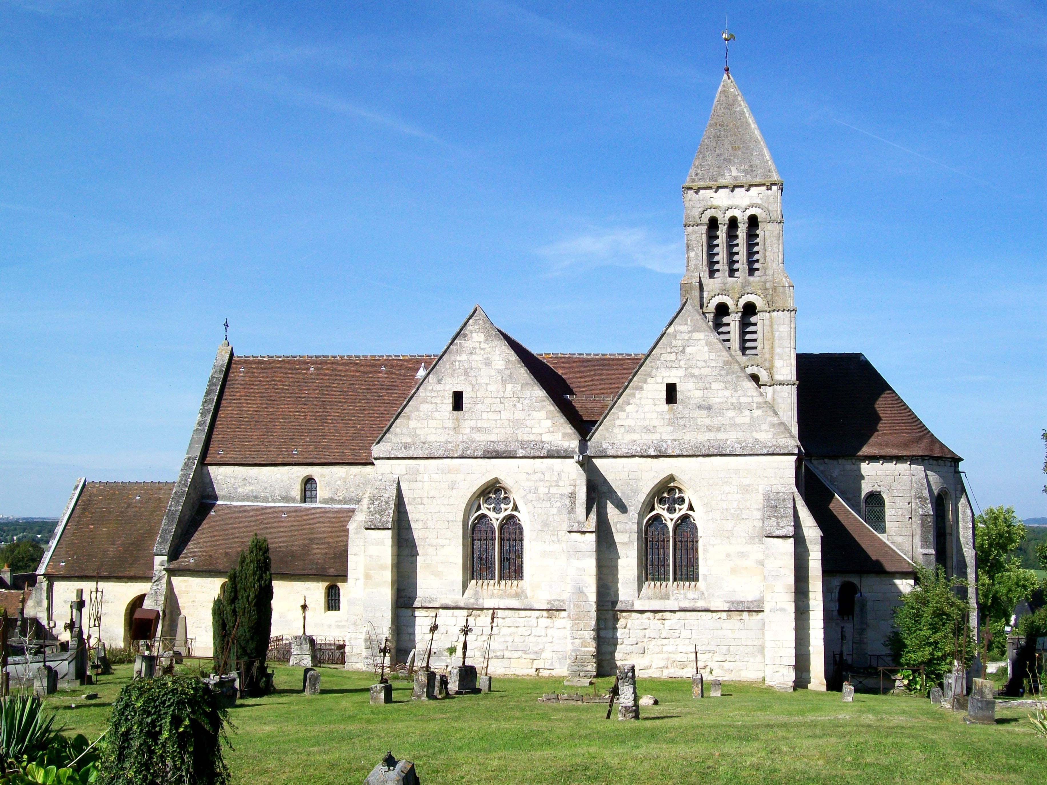 l'église Saint-Gervais avec son clocher du XIe siècle et le cimetière abandonné.